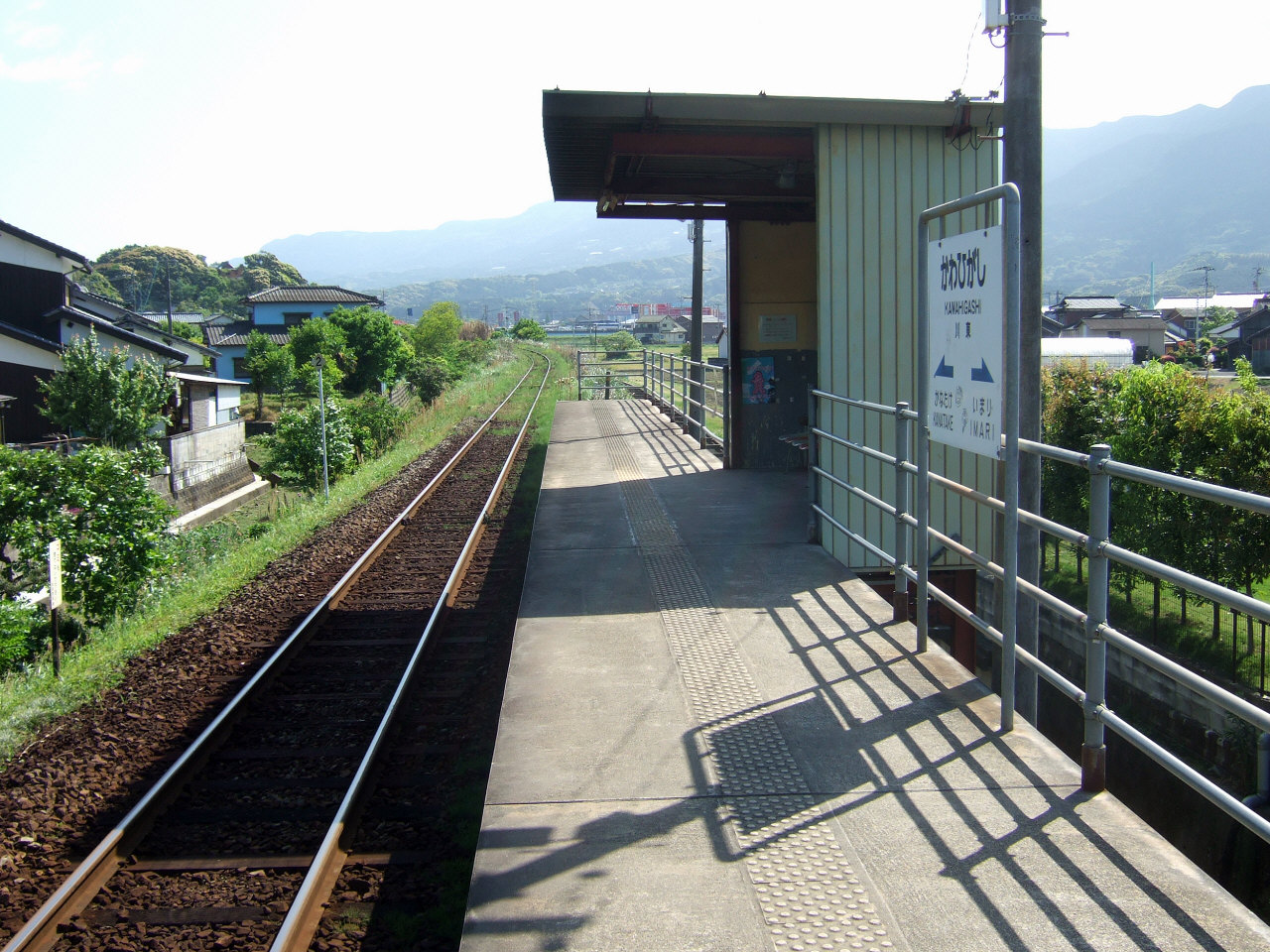 松浦鉄道川東駅（Matsuura Railway Kawahigashi Station）